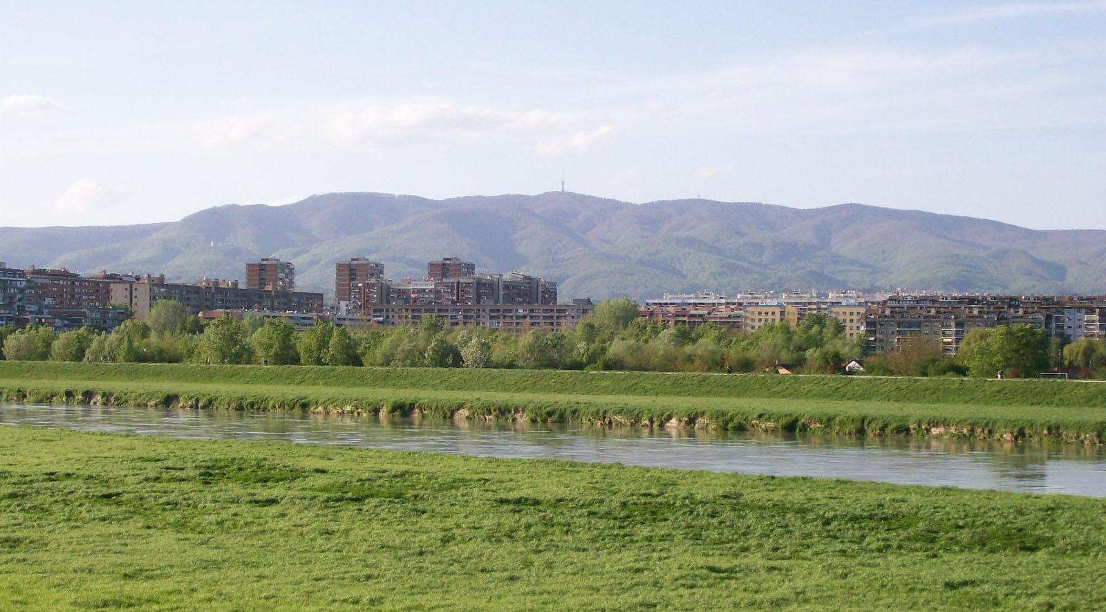 Pogled na Medvednicu, rijeku Savu i naselje Savica, Zagreb, Hrvatska